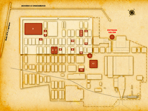 Plano del Campo de Prisioneros Chacabuco, emplazado en la ex – Oficina Salitrera Chacabuco. Funcionó entre 1973 y 1974, albergando a 1.500 prisioneros políticos y opositores al régimen de Pinochet.